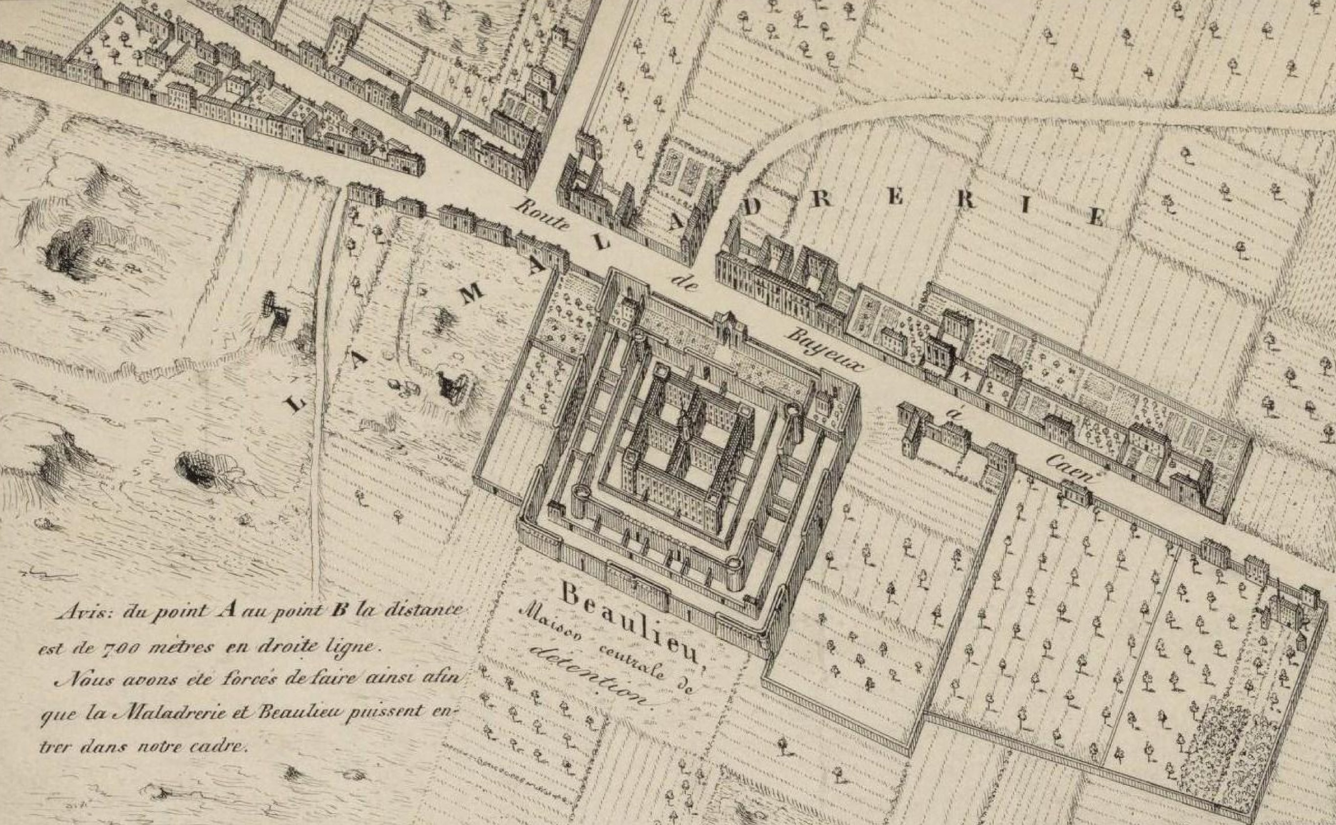 plan de la Maladrerie au milieu du XIXe siècle.